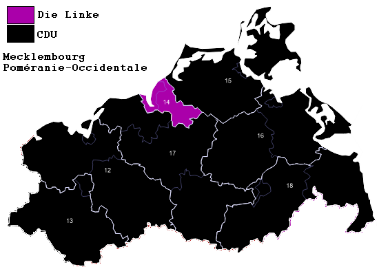 Districts du Länd en 2009.